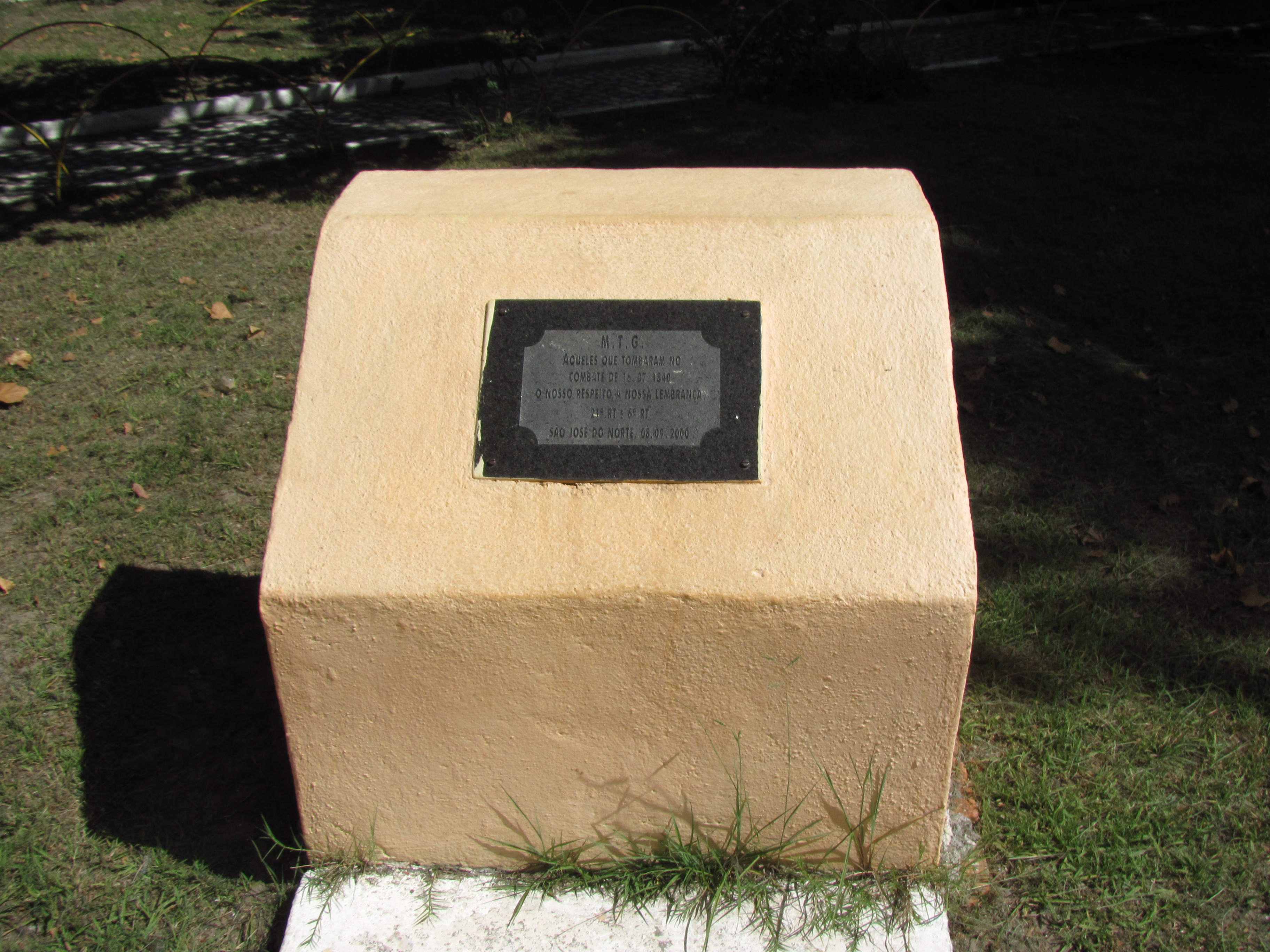 Homenagem a uma batalha farroupilha